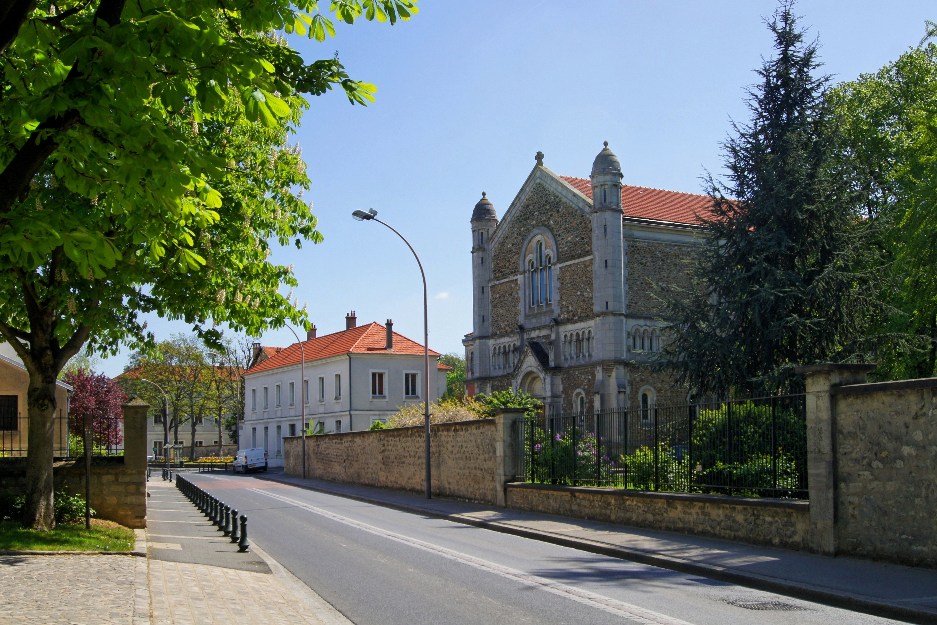 Chevilly Larue devant l'église